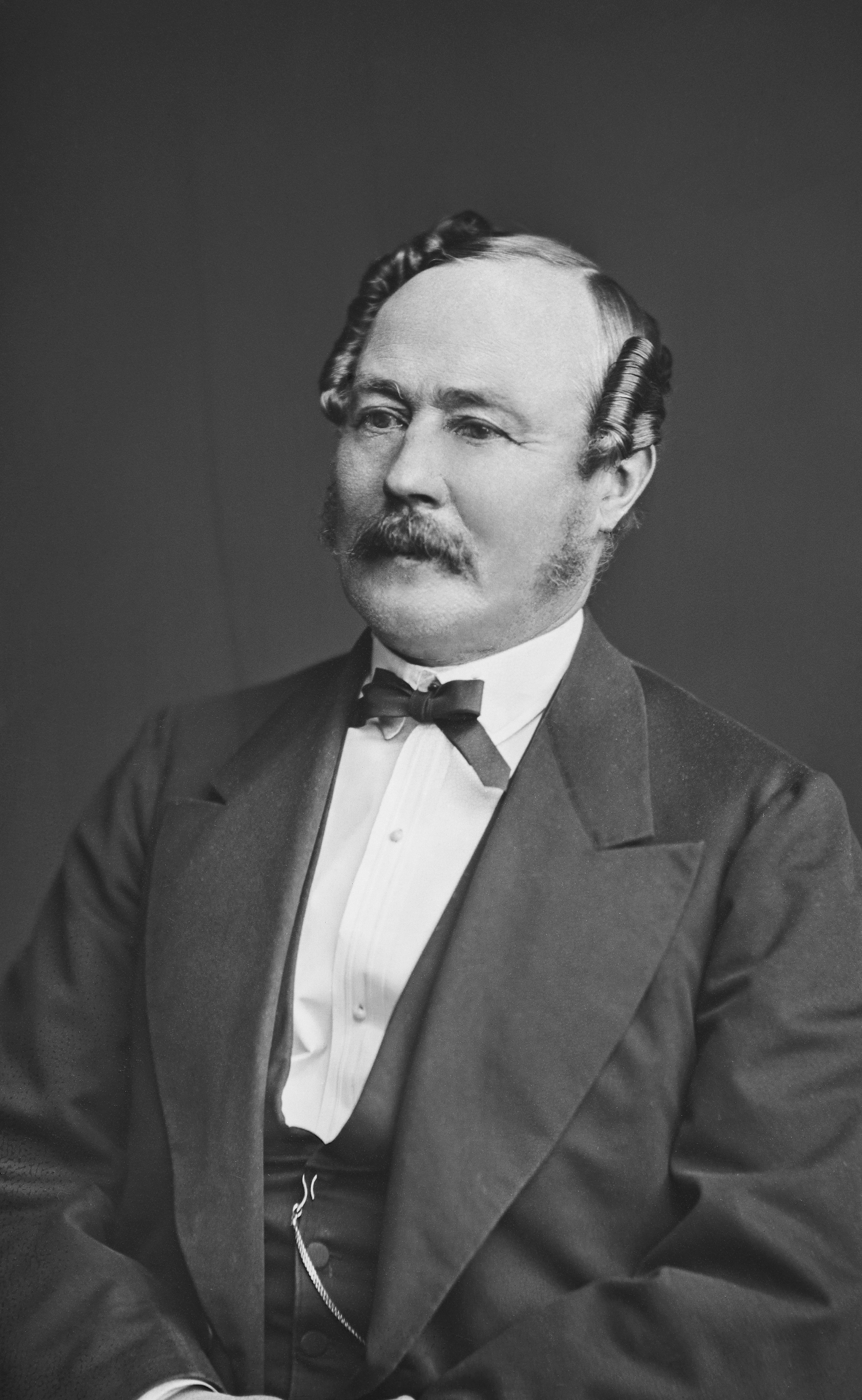 Luutnantti Gustaf Johan Silfversvan. Pysty, mustavalkoinen, retusointi, retusointi korjattu digitoinnin yhteydessä.